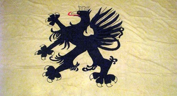 Haft z gryfem kaszubskim Franciszki Majkowskim